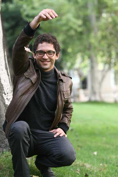 El actor español Paco León, en una entrevista para 20 Minutos